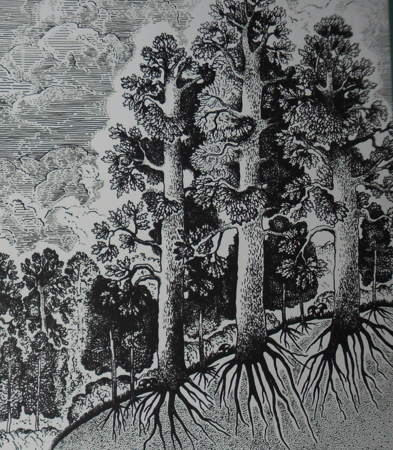 Фото